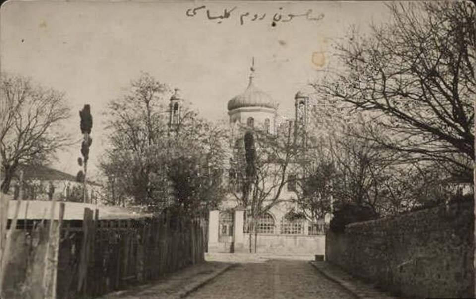 Eskiden, günümüzde 23 Nisan İÖO'nun olduğu yerde bulunan Aya Triada Rum Ortodoks Kilisesi.